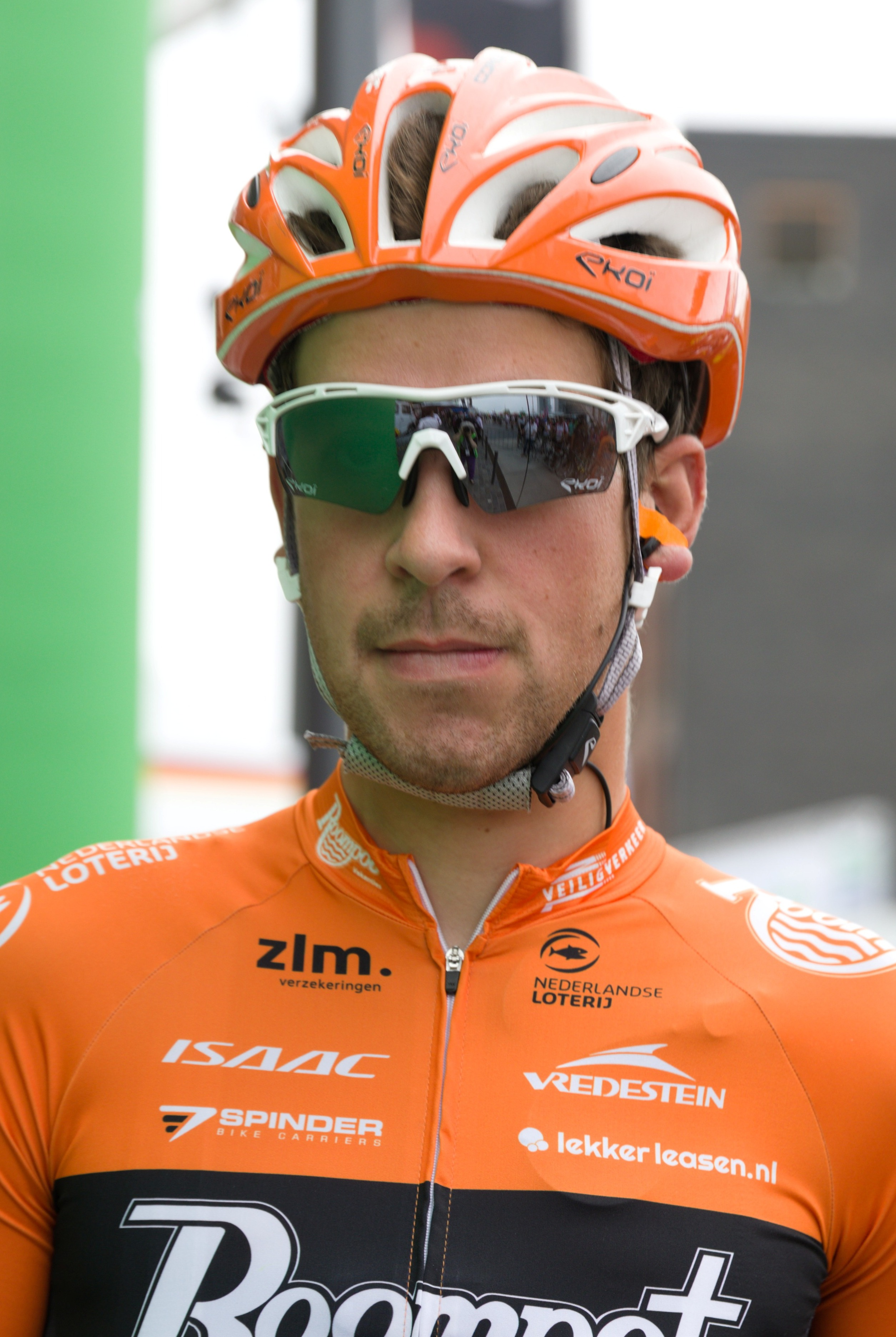 Brian van Goethem, niederländischer Radsportler